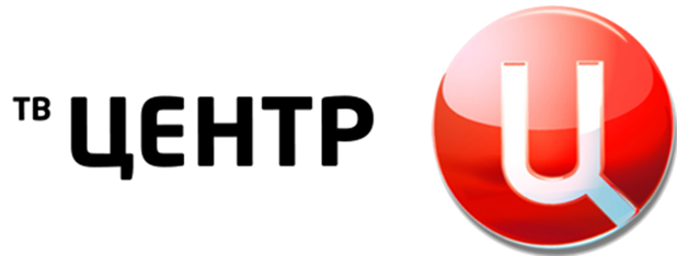 Логотип телеканала ТВ Центр, используемый с 25 сентября 2012 по 25 августа 2013, но не в эфире.